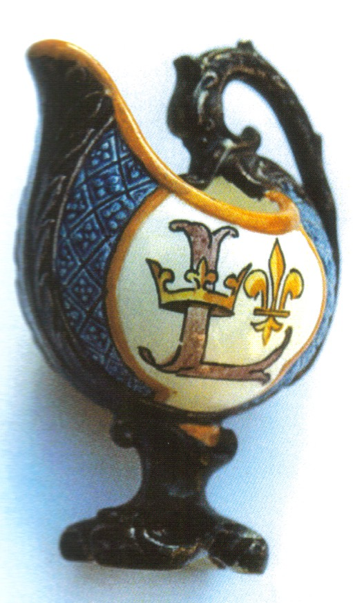 adrien thibault pichet